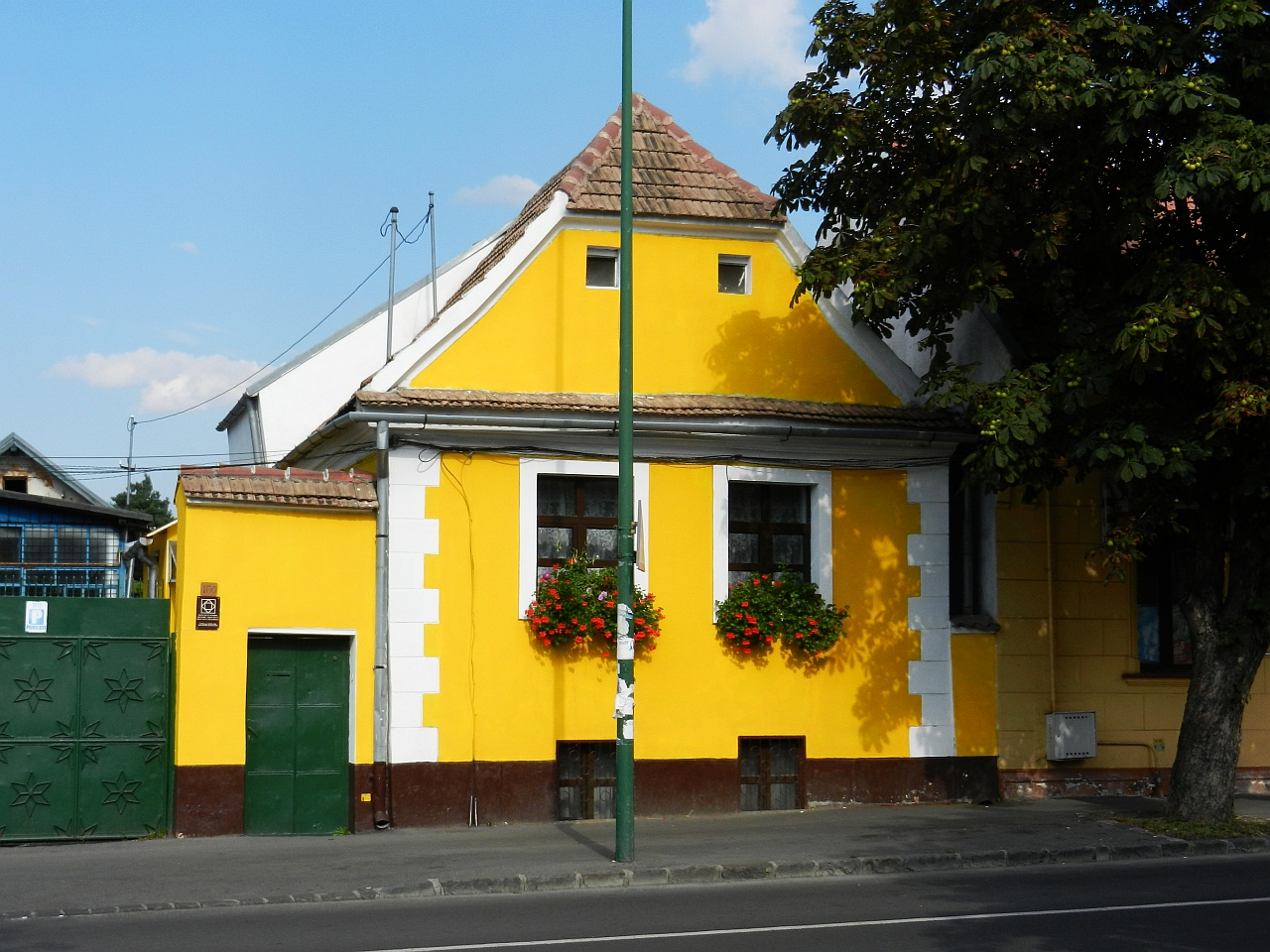 Casa monument istoric (Lunga 150)